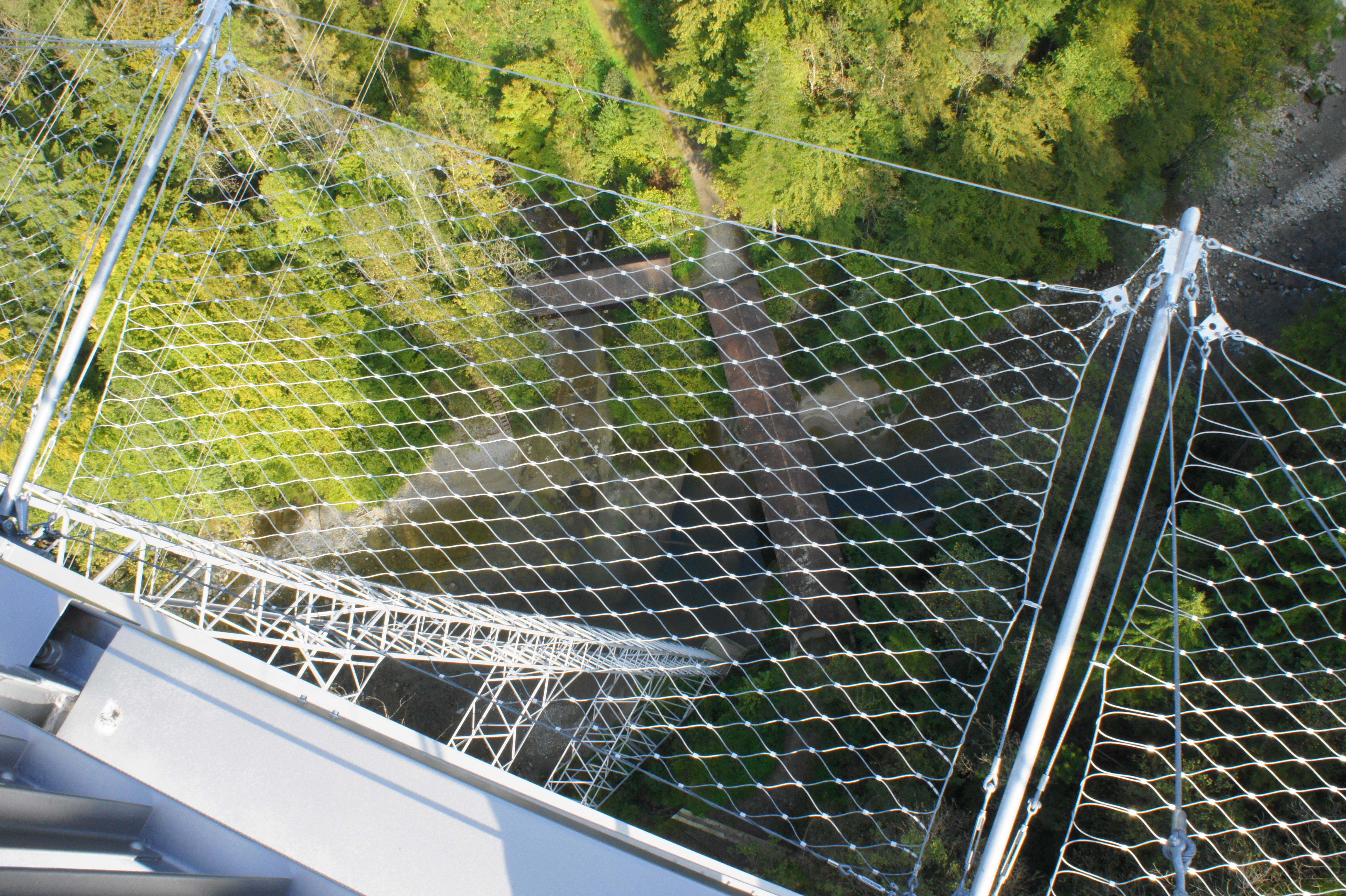 Blick vom Eisensteg Zweibruggen durch das Maschendraht-Auffangnetz der grössten Stütze entlang hinunter zu den zwei alten, gedeckten Holzbrücken; Mitte rechts: die Sitter-Brücke; Mitte oben: Wattbach-Brücke